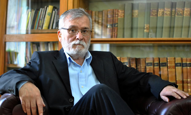 Hernán Miranda Casanova en Círculo de Periodistas de Santiago